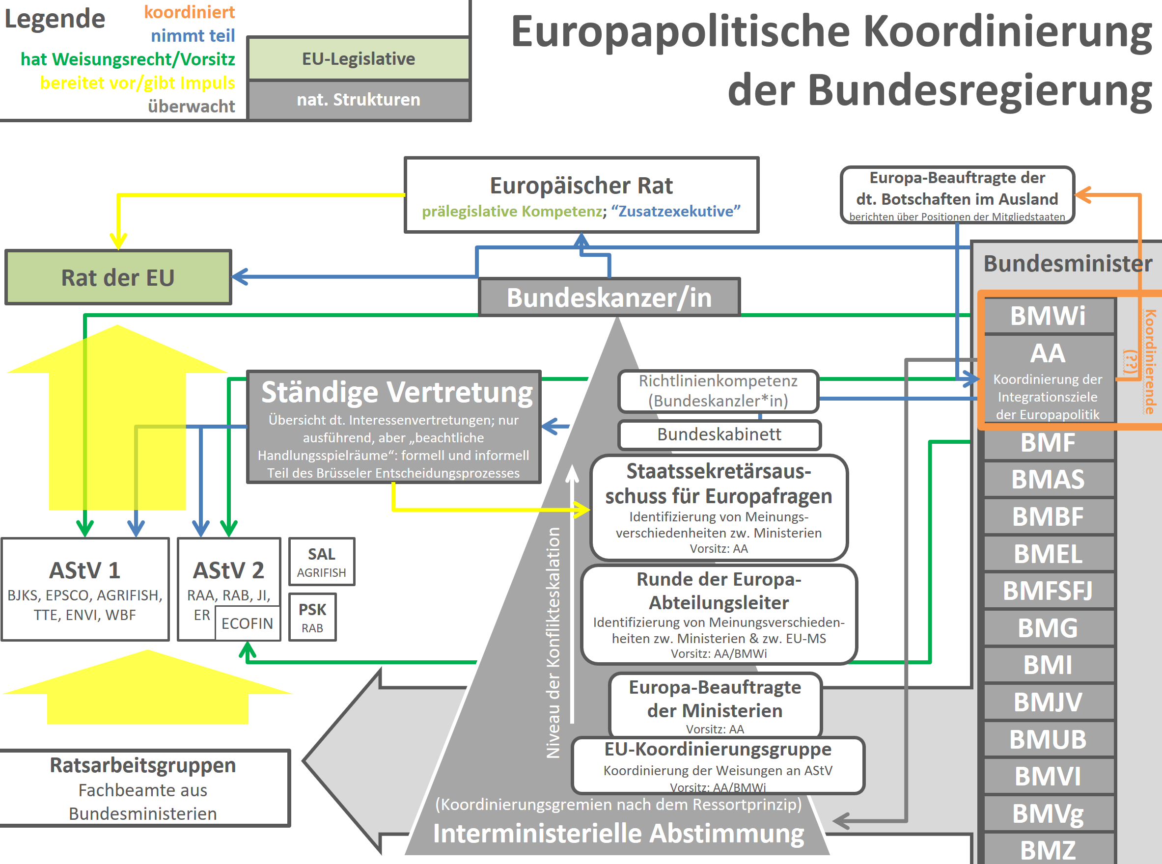 Schema der Koordinierung der Europapolitik durch die deutsche Bundesregierung